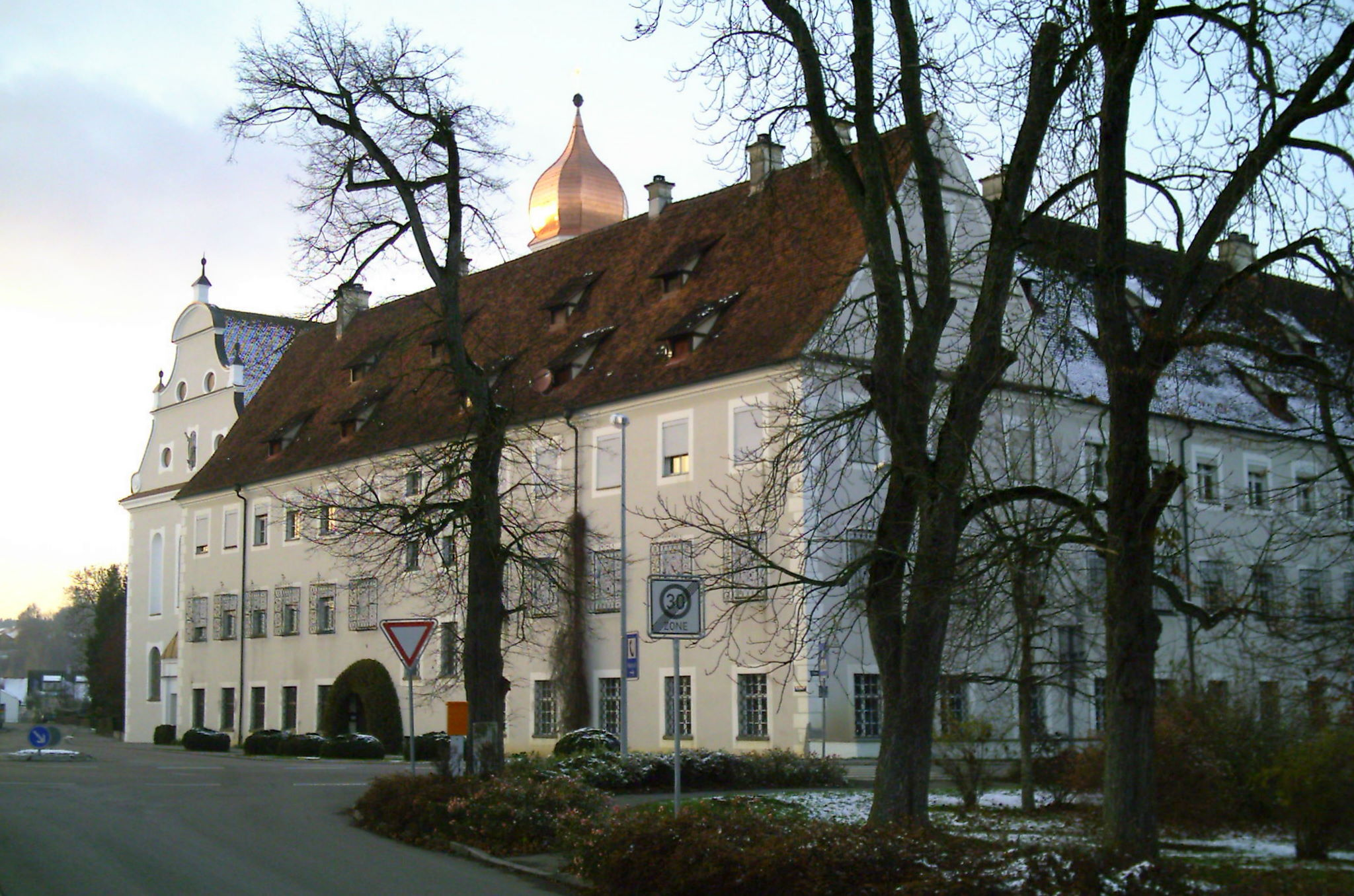 Ehemaliges Kloster, Pfleghof und Turm der röm.-kath. Kirche St. Martin in 88459 Tannheim, Baden-Württemberg, Deutschland - Sitz Gräflich von Schaesberg'sche Forstverwaltung